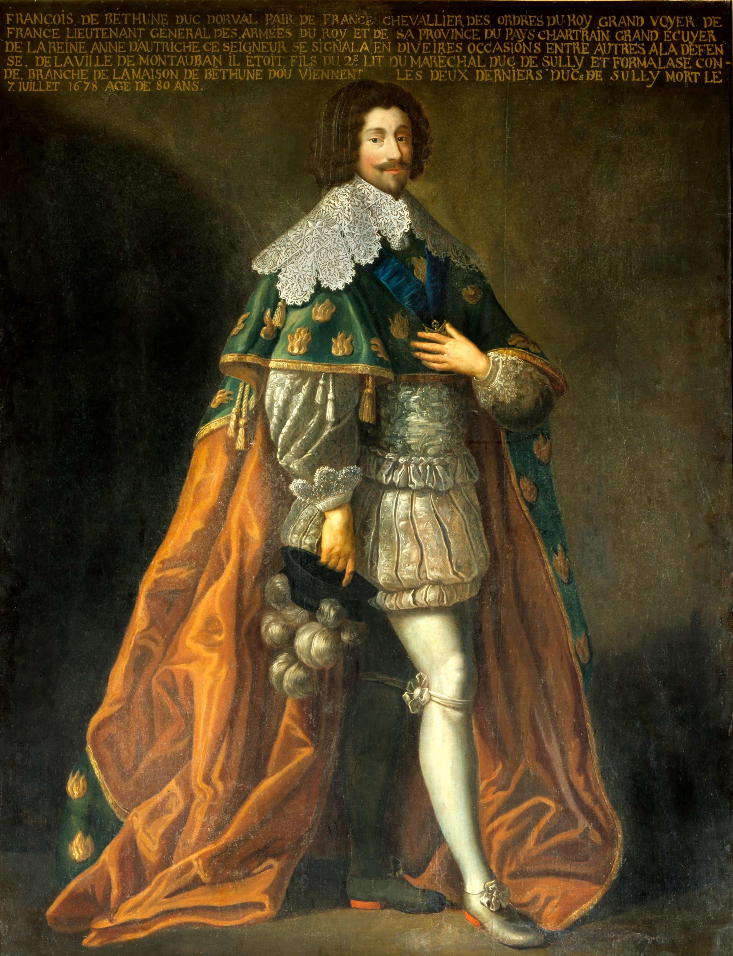 Portrait du Francois de Béthune, Duc d'Orval, Pair de France